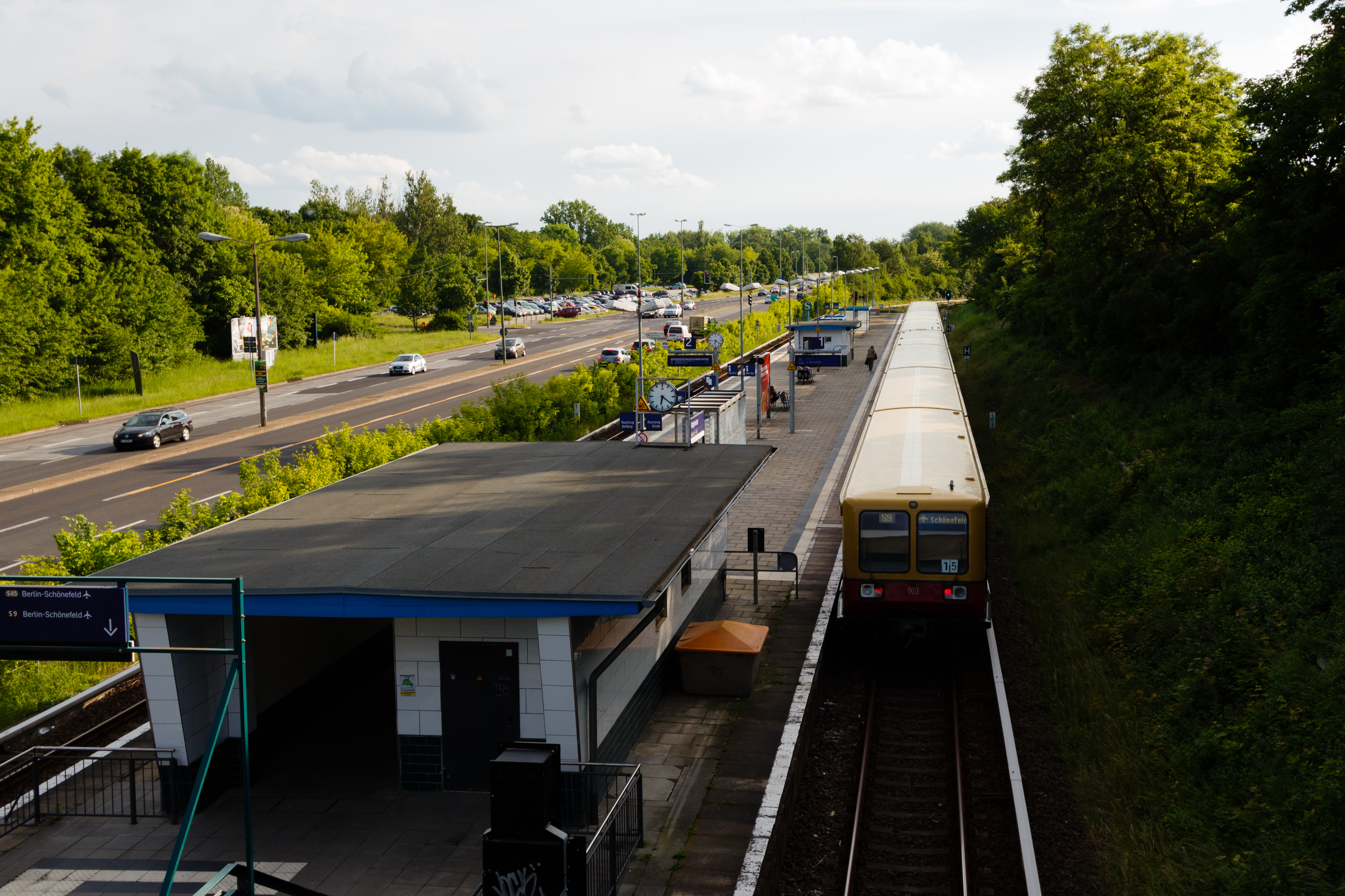 S-Bahnhof Altglienicke von der Zugangsbrücke aus fotografiert